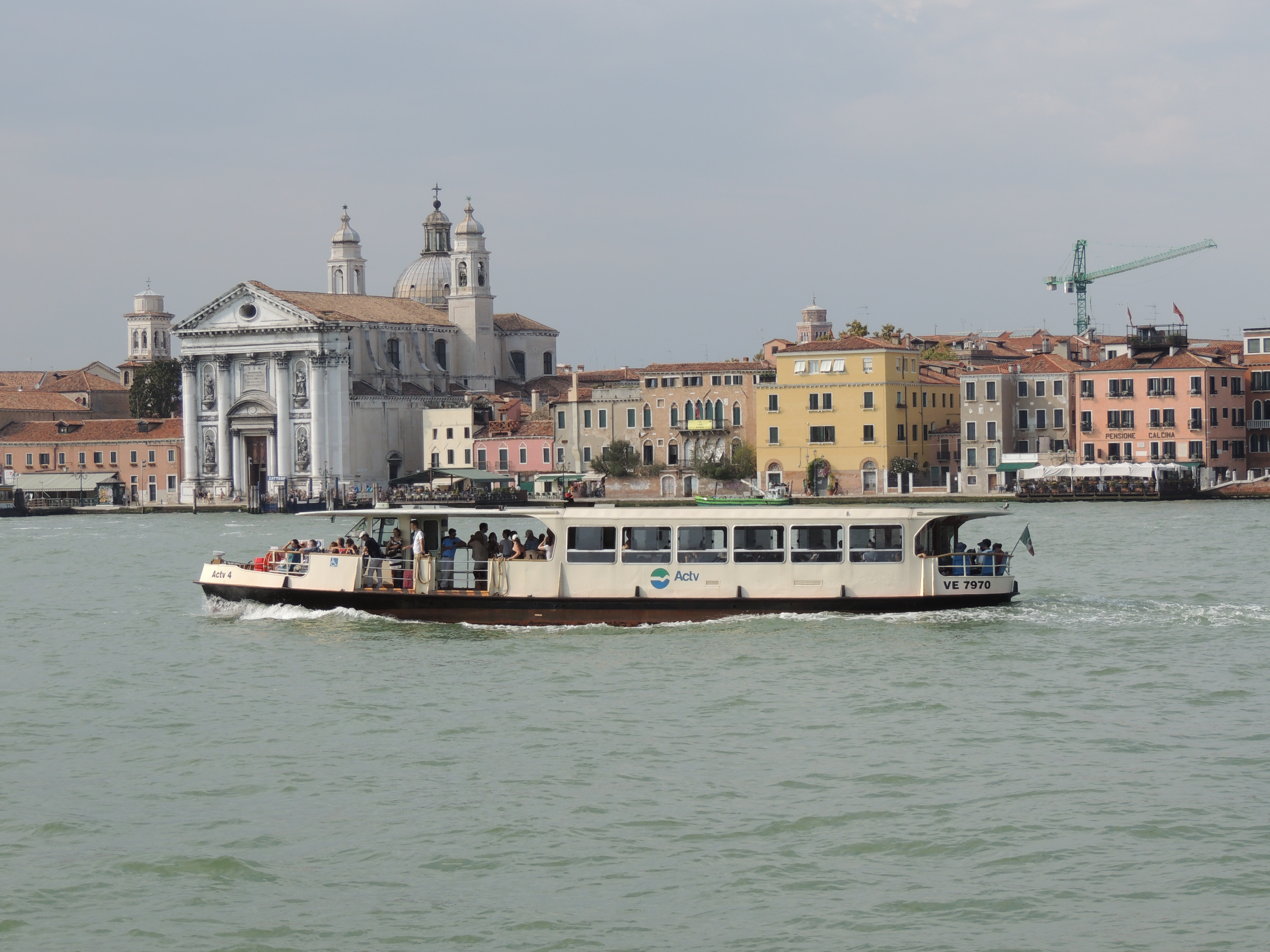 Vaporetto